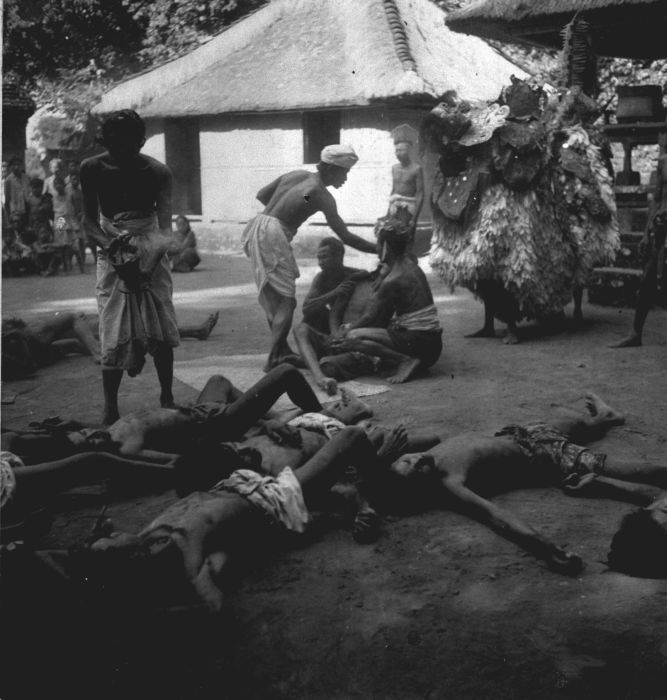 Foto. Krisdansers in trance met de Barong, Pagoetan